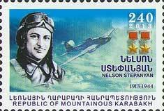 Nelson Stepanyan (1913-1944)